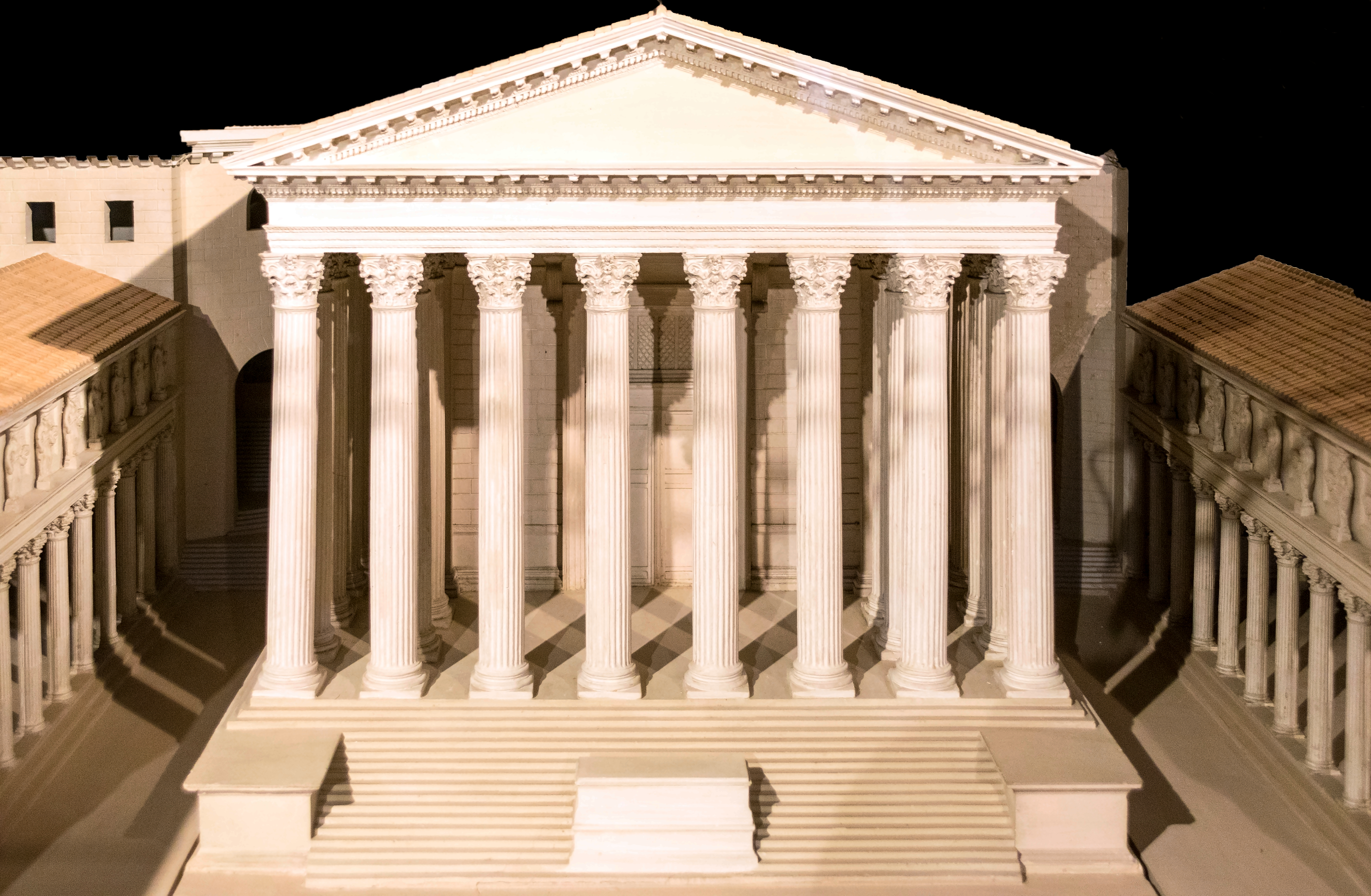 Miniatur des Mars-Ultor-Tempels. Die Plastik, die zum Modell des Augustusforums gehört, wurde von Italo Gismondi in den 1930'er Jahren angefertigt